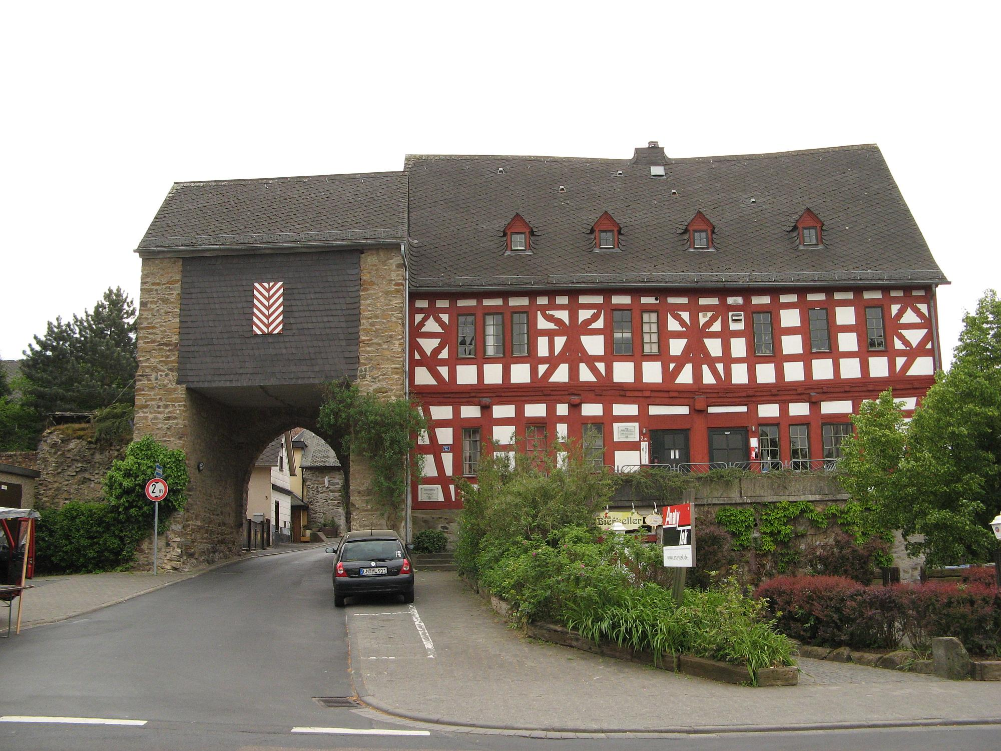 Limburger Pforte der Hadamarer Stadtmauer mit angebautem Jesuiteninternat